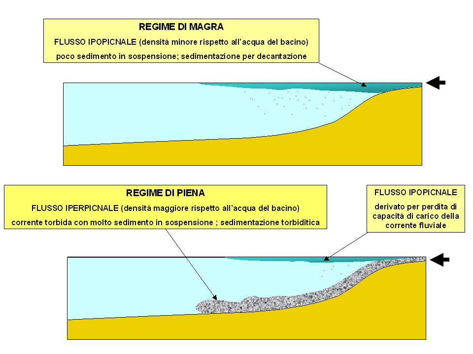 Schema concettuale dei meccanismi di sedimentazione in relazione al regime di flusso in un sistema deltizio fluviale. Conceptual scheme of sedimentation and flux types in a deltaic depositional system. Text in italian.